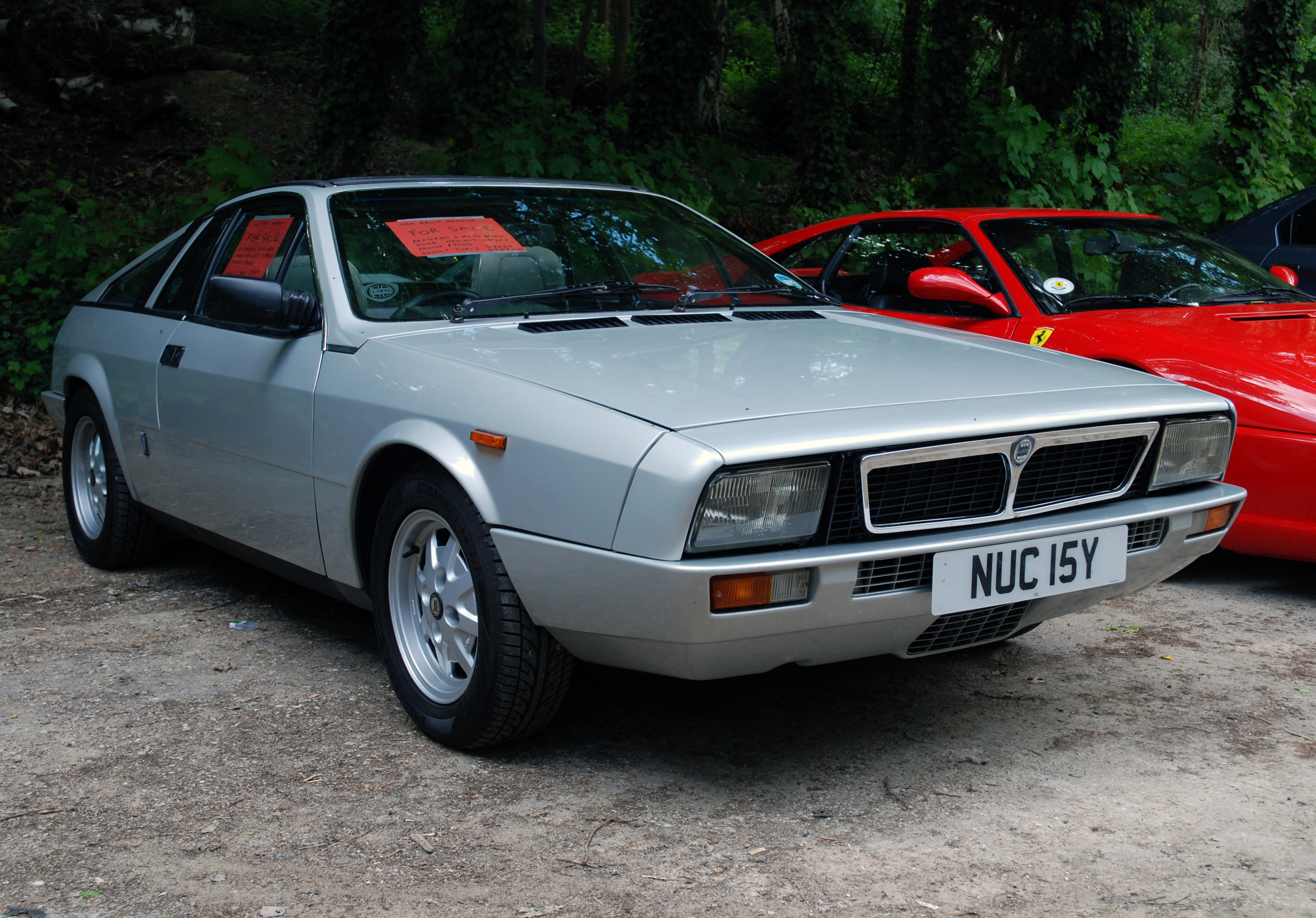 Brooklands,May 2009